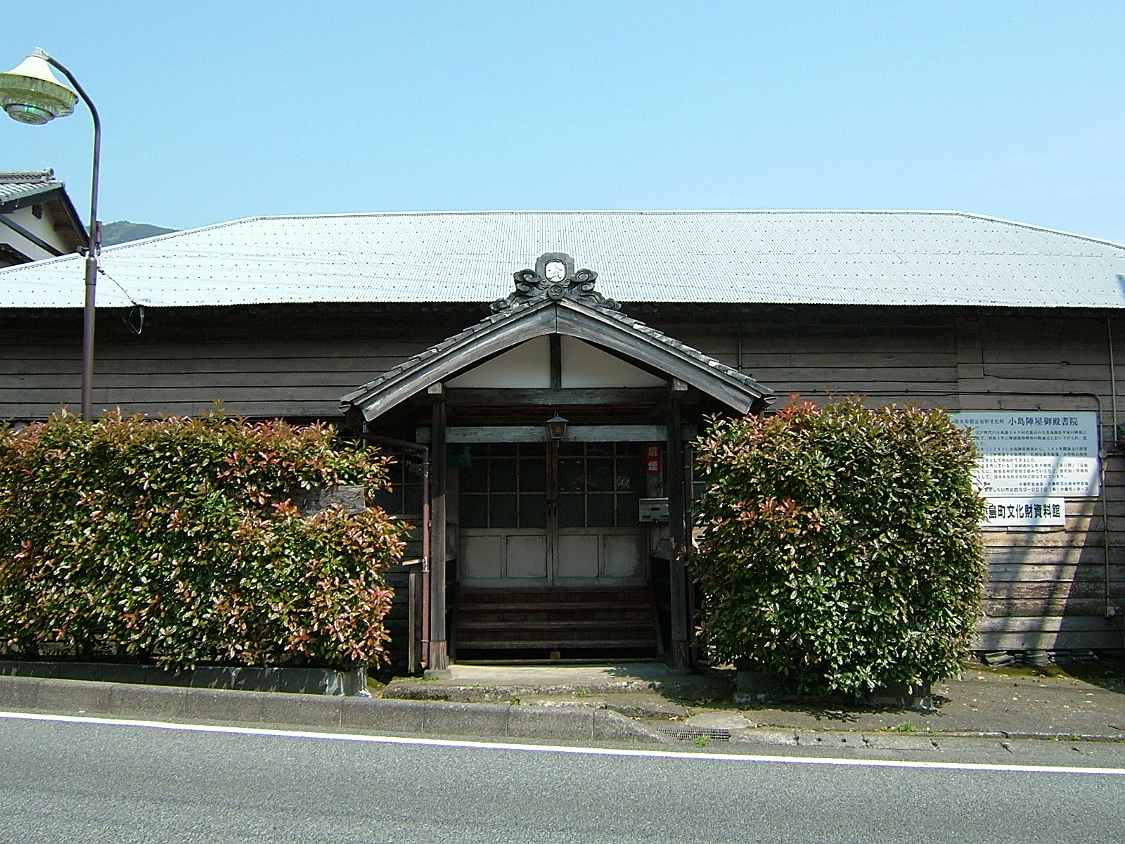 小島町文化財資料館（52号線反対側から撮影）